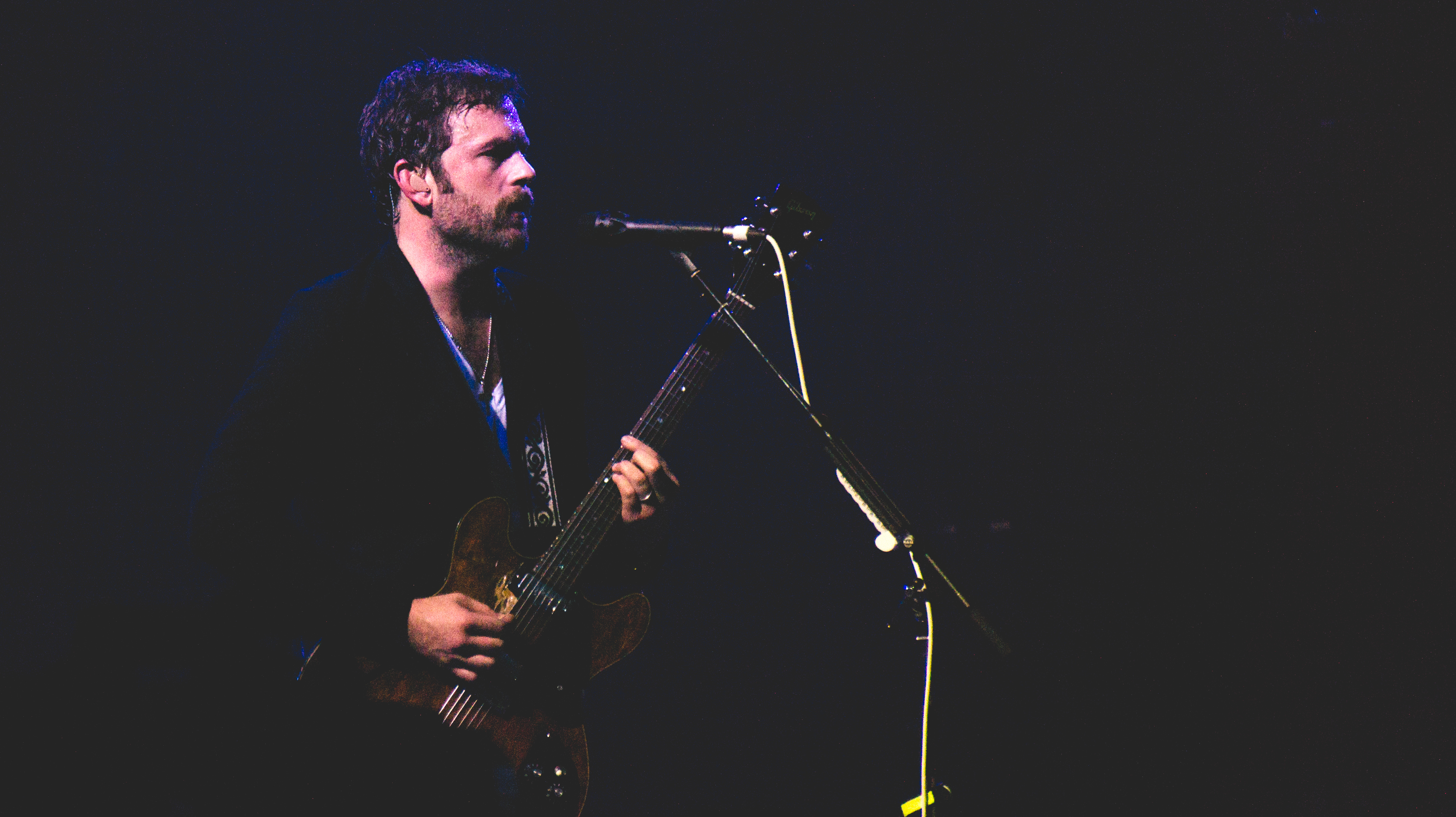 KoLHydePark060717-22